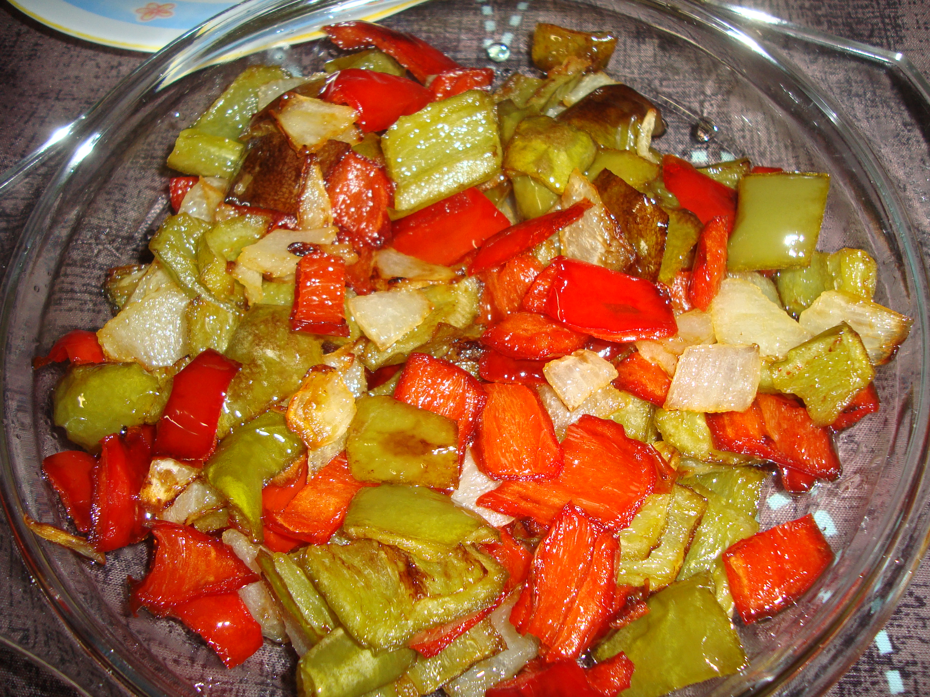 Pebrera i seba